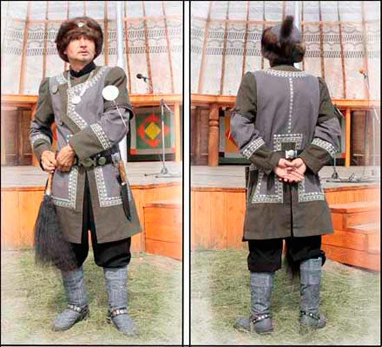 Традиционный якутский мужской костюм (кафтан). Снято во время праздника Ысыах в 2010г.